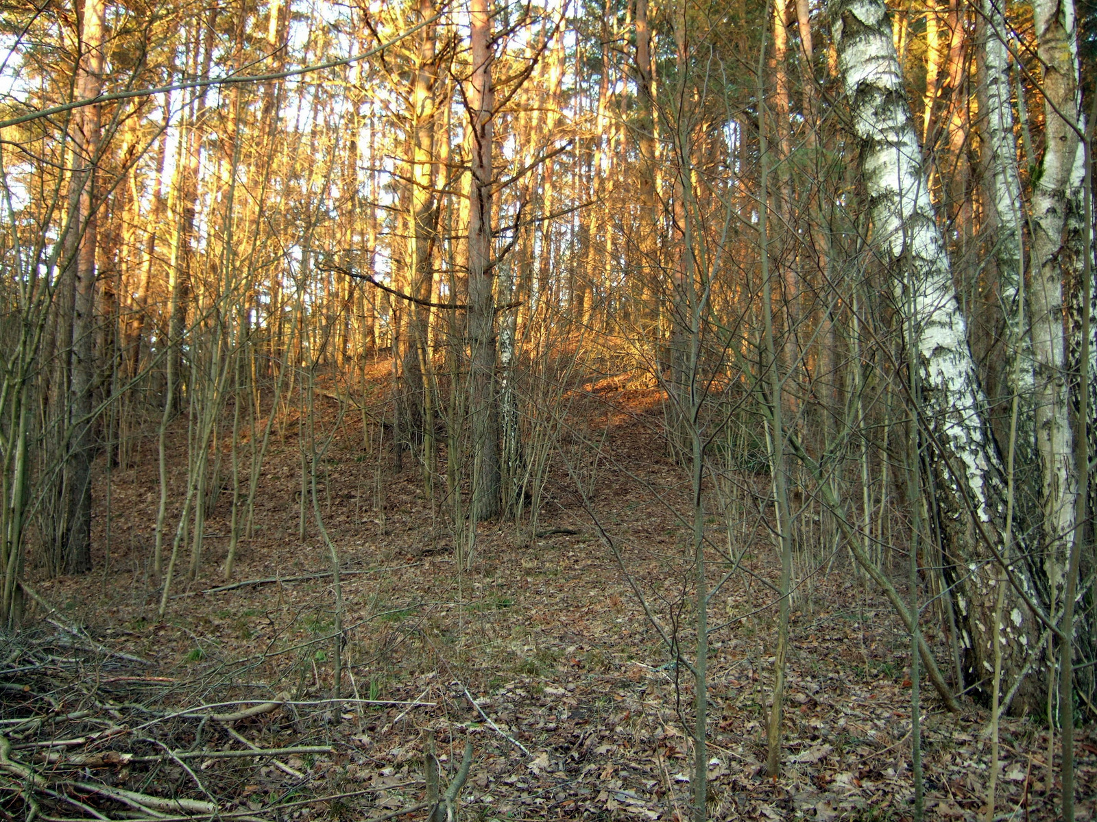 Gudelių piliakalnio (Vilnius) viršus.